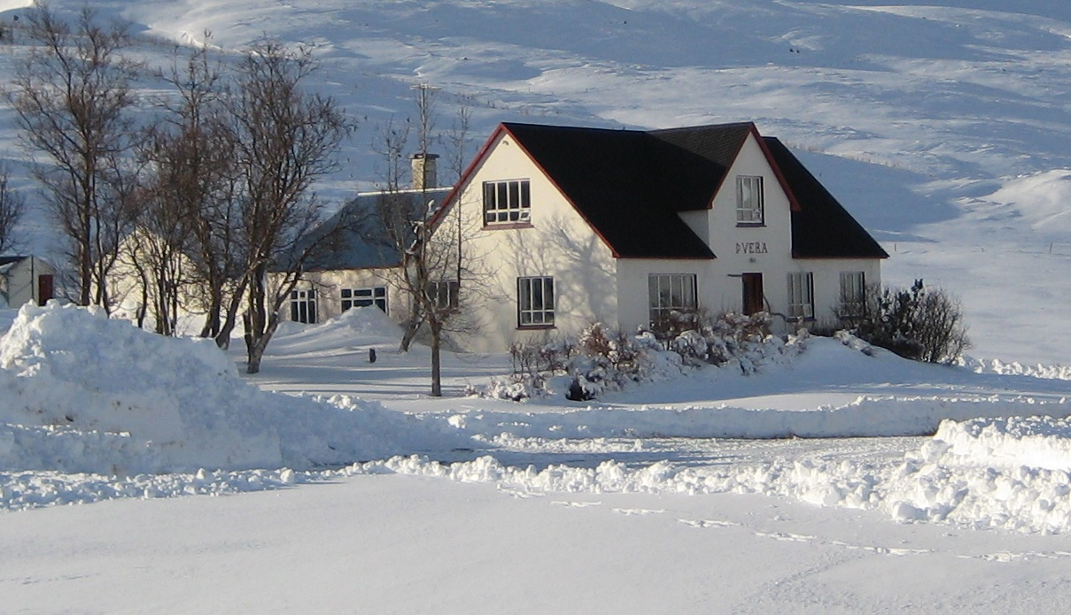 Þverá í Skíðadal, Dalvíkurbyggð